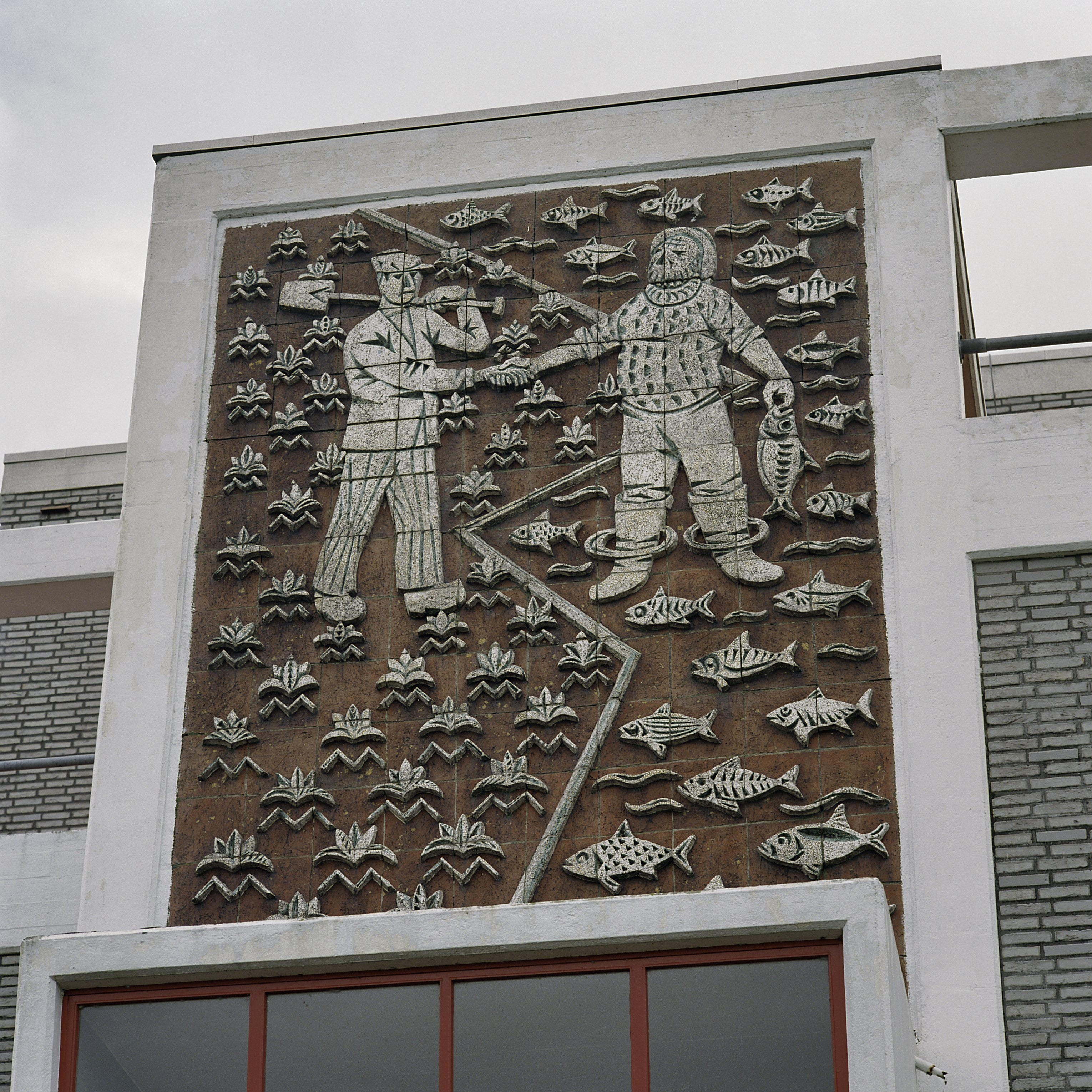 Gemaal H.J. Lovink: In de kopgevel zit een keramisch reliëf van J.M. Roosenburg (opmerking: Gefotografeerd voor Monumenten In Nederland Flevoland)